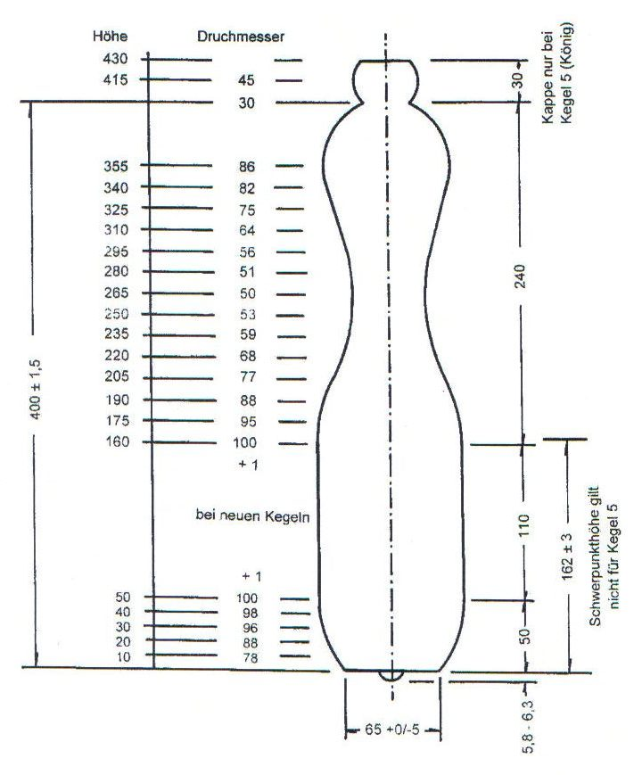 Maße eines Kegel